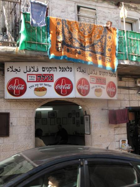 מסעדת פלאפל בואדי ניסנאס